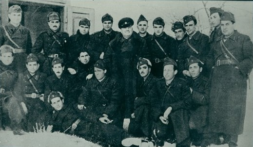 Помощник-командирите от 10-а пехотна родопска дивизия с генерал-лейтенант Фердинанд Козовски.